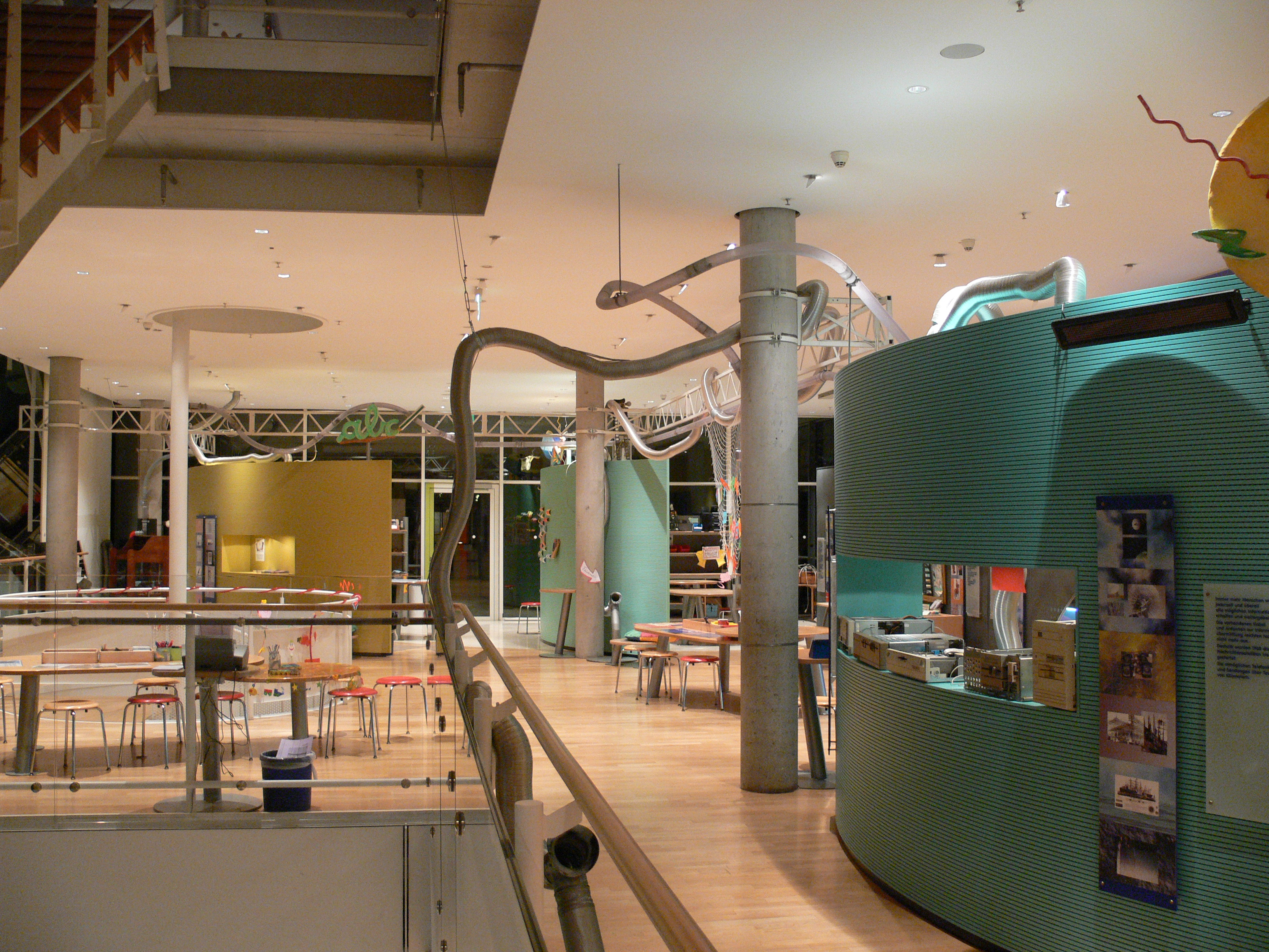 Museum für Kommunikation, Frankfurt am Main